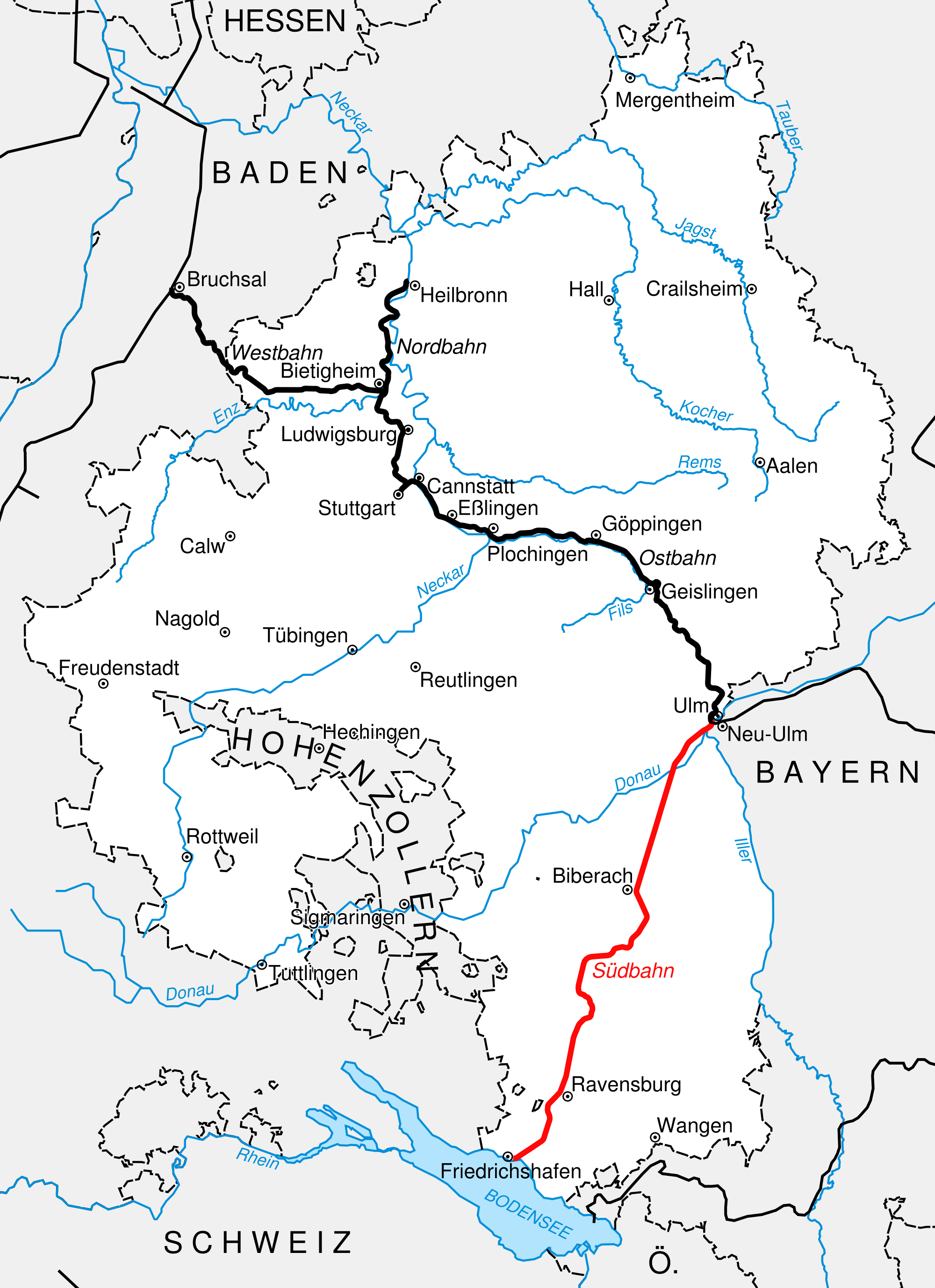 Karte des württembergischen Eisenbahnstreckennetzes, Stand 1854. Rot markiert: Südbahn (Ulm–Friedrichshafen).